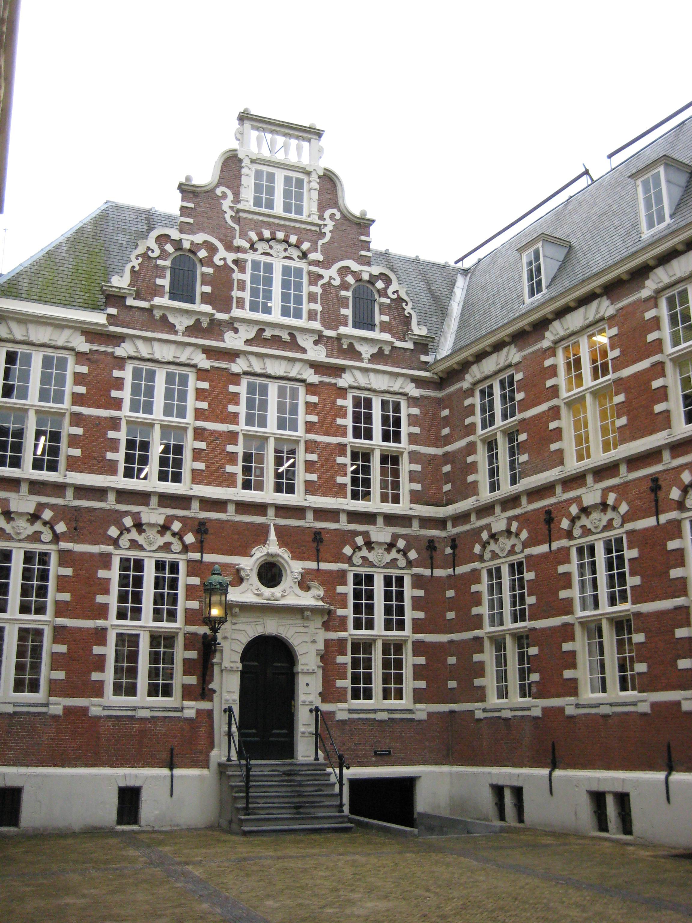 VOC Amsterdam building